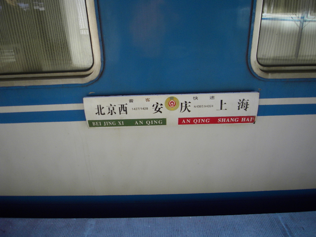 1427/1428次列车（现K1071/1072次）水牌